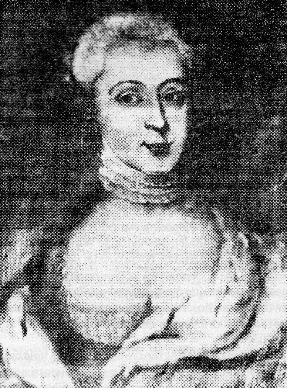 Anna Jabłonowska - portret z epoki. Księżna, wojewodzina bracławska (jako żonaJana Kajetana Jabłonowskiego), ekonomistka, kolekcjonerka, mecenas nauki i sztuki, sprawna administratorka swoich dóbr.